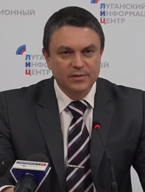 Брифинг министра госбезопасности ЛНР Леонида Пасечника. 4 ноября 2016 года